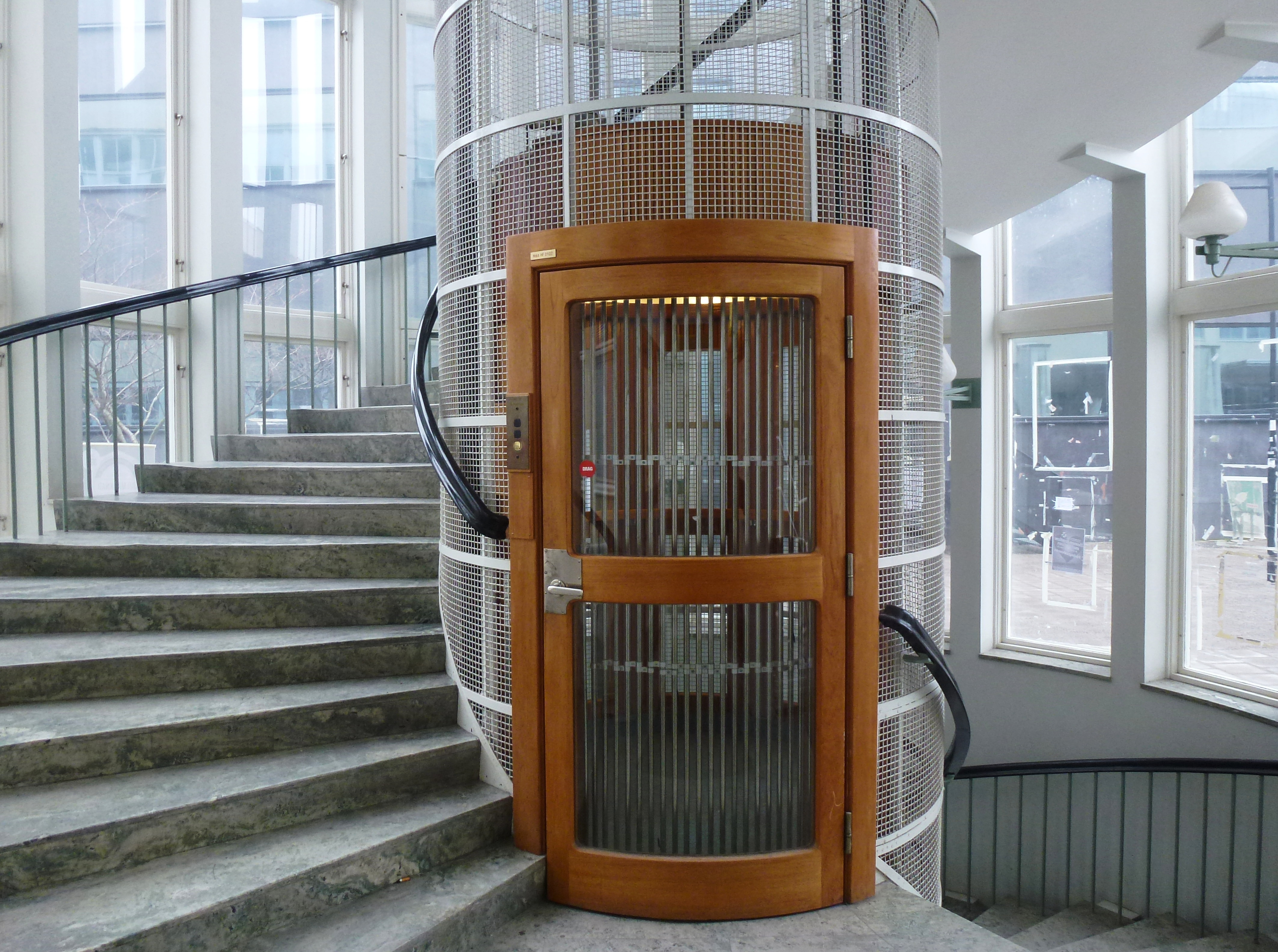 Huvudtrappa (spiraltrappa) med hiss